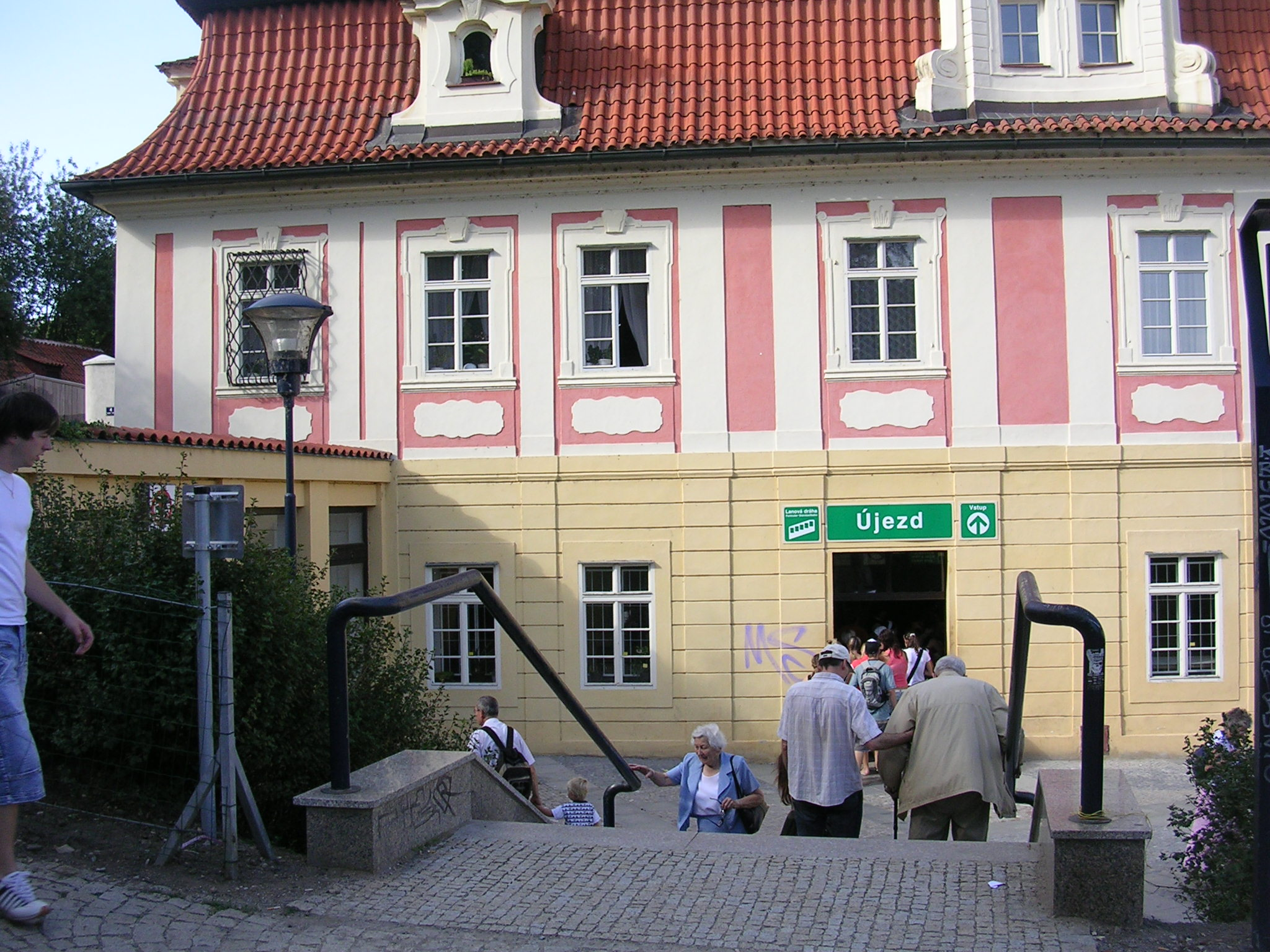 Praha, lanová dráha na Petřín, stanice Újezd